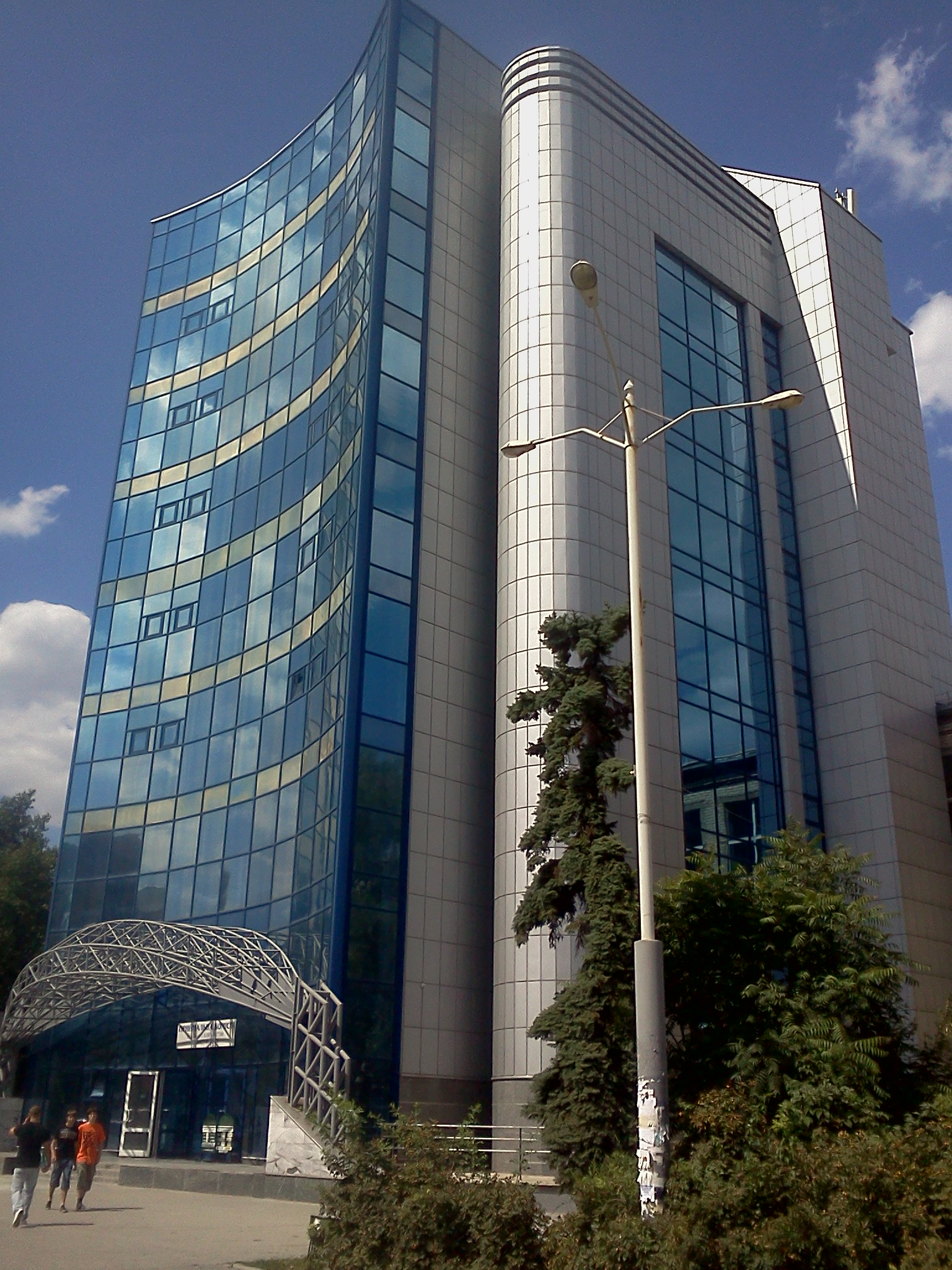 Синий корпус Восточноукраинского Национального Университета имени В.Даля